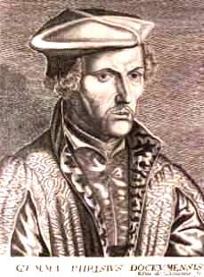 Gemma Frisius Holzschnëtt